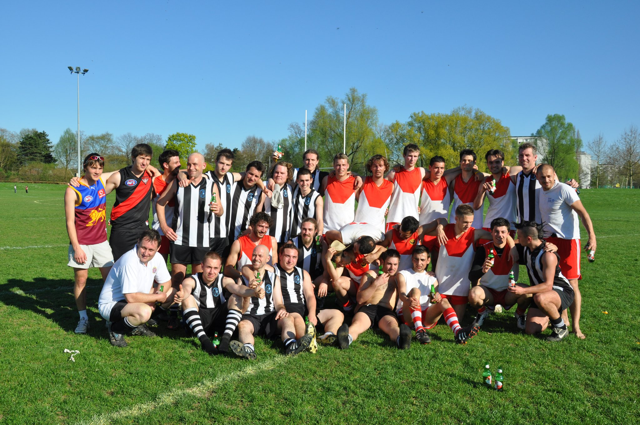 match de football australien, saison 2010/11, 1er avril 2011